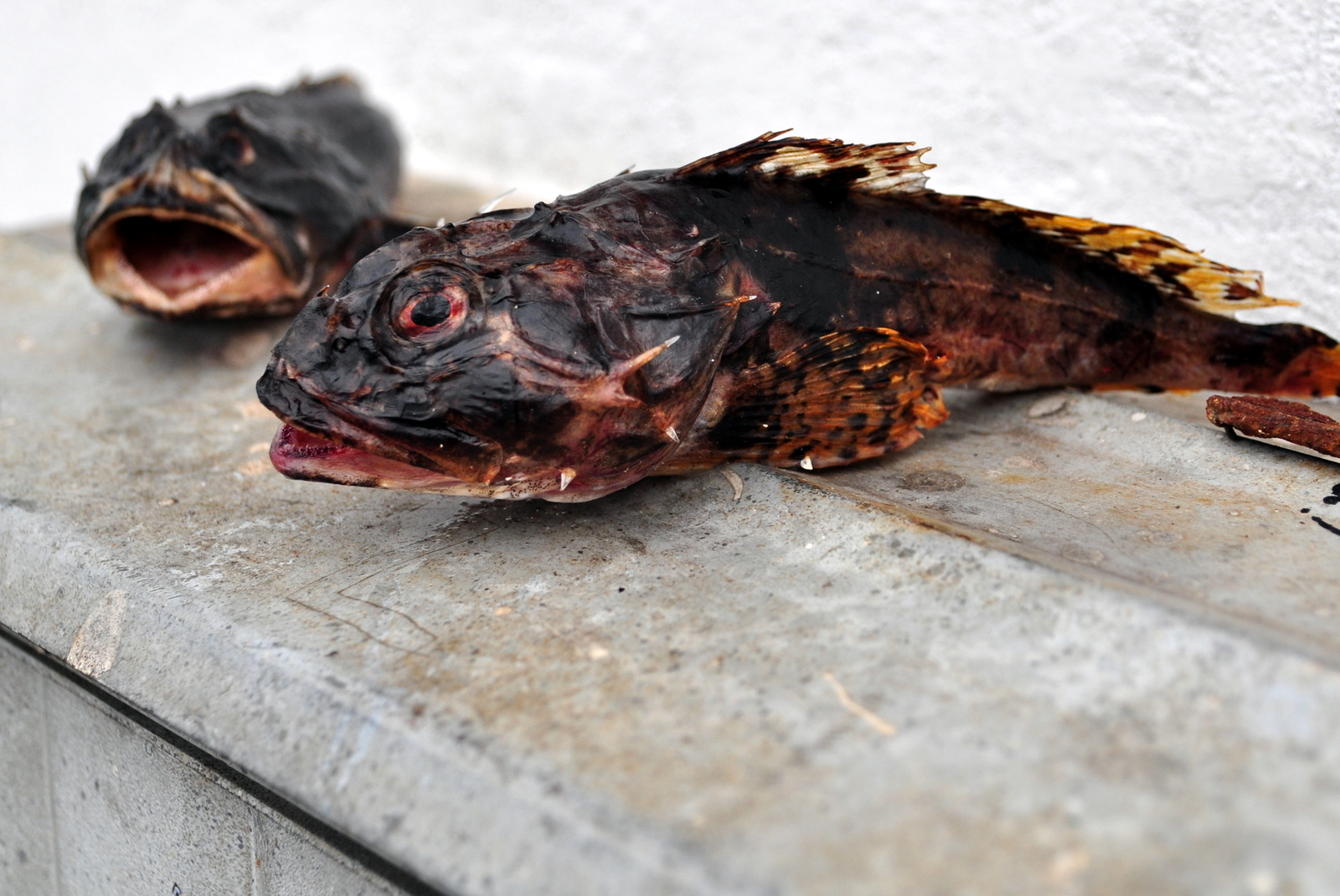 Wyłowione przez rybaków z Chłopów na Wybrzeżu Słowińskim